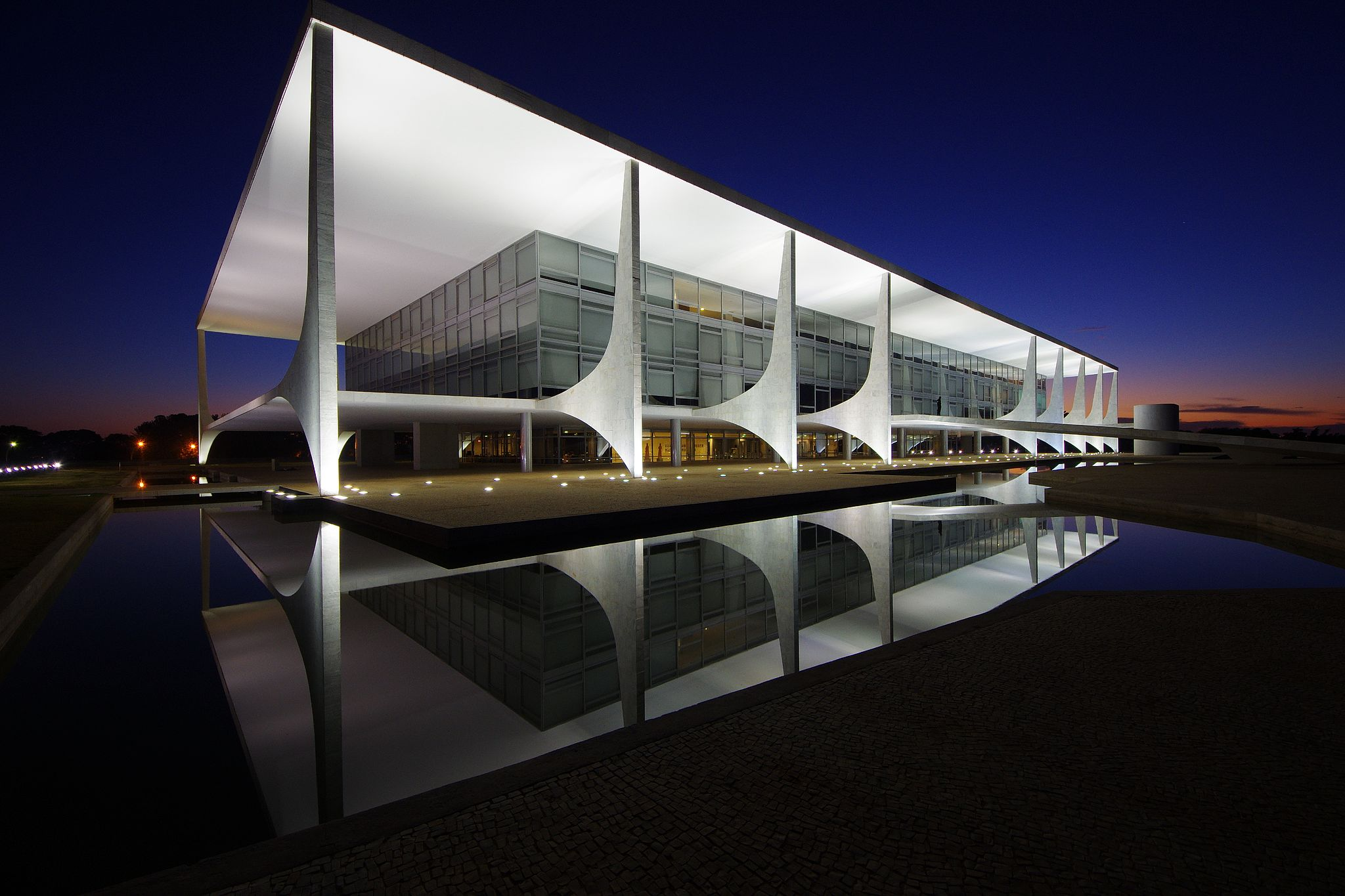 Palácio do Planalto. Foto: Roberto Stuckert/PR O Ministério da Cultura, por meio do Instituto do Patrimônio Histórico e Artístico Nacional (Iphan), homologou o tombamento de um conjunto de 27 obras do arquiteto Oscar Niemeyer, localizadas em Brasília, Rio de Janeiro e São Paulo. As obras passam agora a ser protegidas pelo Iphan como Patrimônio Cultural Brasileiro. São elas: o Museu da Cidade, o Espaço Lúcio Costa, o Panteão da Liberdade e Democracia, o Teatro Nacional, o Memorial JK, o Memorial dos Povos Indígenas, o Conjunto Cultural Funarte, o Espaço Oscar Niemeyer, o Conjunto Cultural da República, o Edifício do Touring Club do Brasil, a Praça dos Três Poderes, a Casa de Chá, Pombal, o Palácio da Justiça, o Palácio Itamaraty e anexos, a Capela Nossa Senhora de Fátima, o Conjunto do Palácio da Alvorada, o Congresso Nacional, o Palácio do Planalto, o Supremo Tribunal Federal, os prédios dos Ministérios e anexos, o Quartel General do Exército, o Palácio Jaburu, todos esses localizados em Brasília (DF). Além dos bens listados na capital federal, estão protegidos também a Casa das Canoas (RJ), o Conjunto da Passarela do Samba (RJ), o Museu de Arte Contemporânea (RJ), o Conjunto do Parque do Ibirapuera – especificamente, a Grande Marquise, o Palácio das Nações (Pavilhão Manoel da Nóbrega), o Palácio dos Estados (Pavilhão Francisco Matarazzo Sobrinho), o Palácio das Indústrias (Pavilhão Armando de Arruda Pereira), o Palácio de Exposições ou das Artes (Pavilhão Lucas Nogueira Garcez, conhecido como "Oca") e o Palácio da Agricultura (SP).